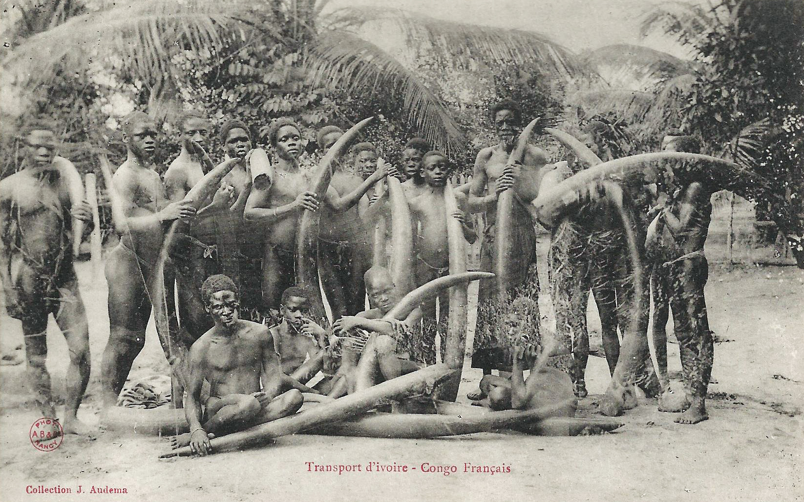 Transport d'ivoire. Congo Français. Collection J. Audema. Phot. A.B. & Cie, Nancy [Albert Bergeret] Congo Français